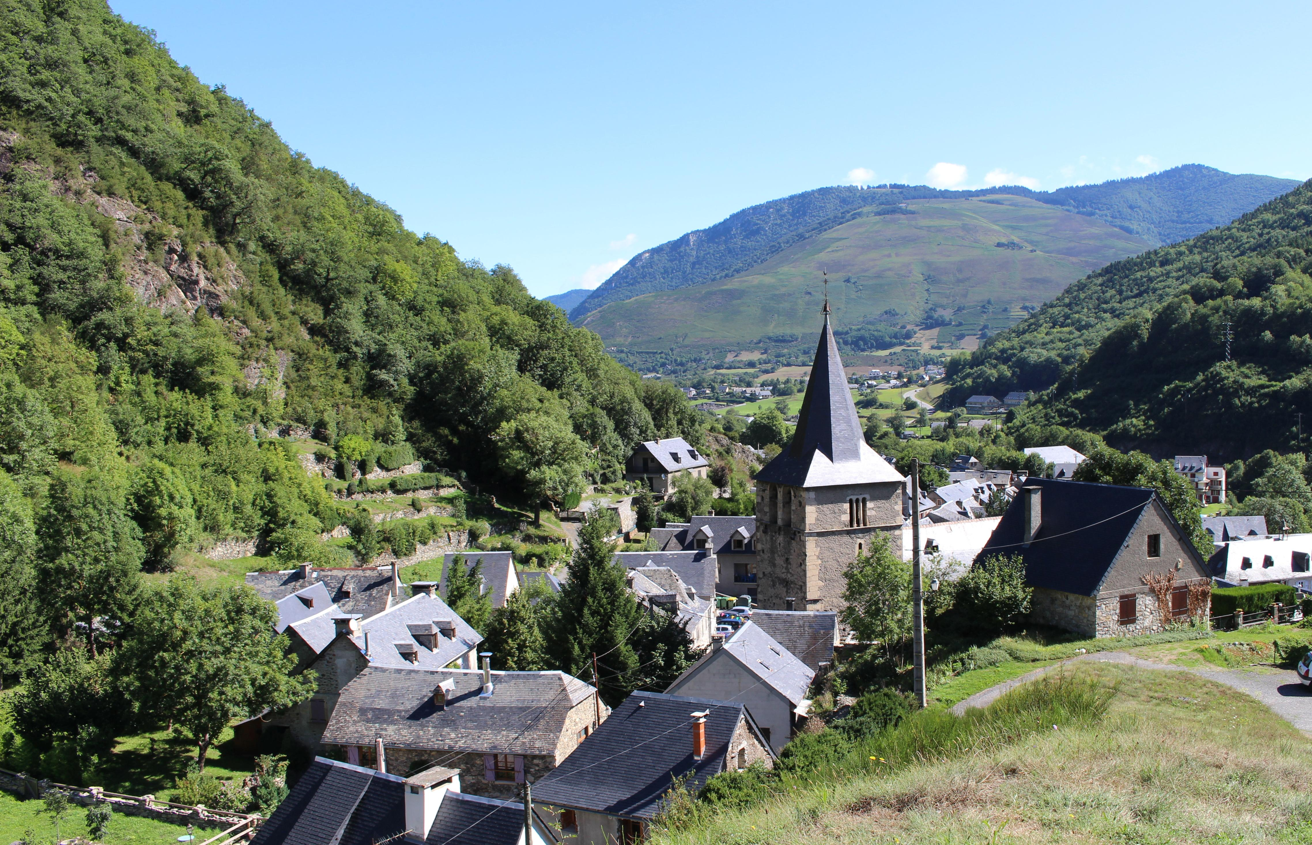 Cadéac (Hautes-Pyrénées)